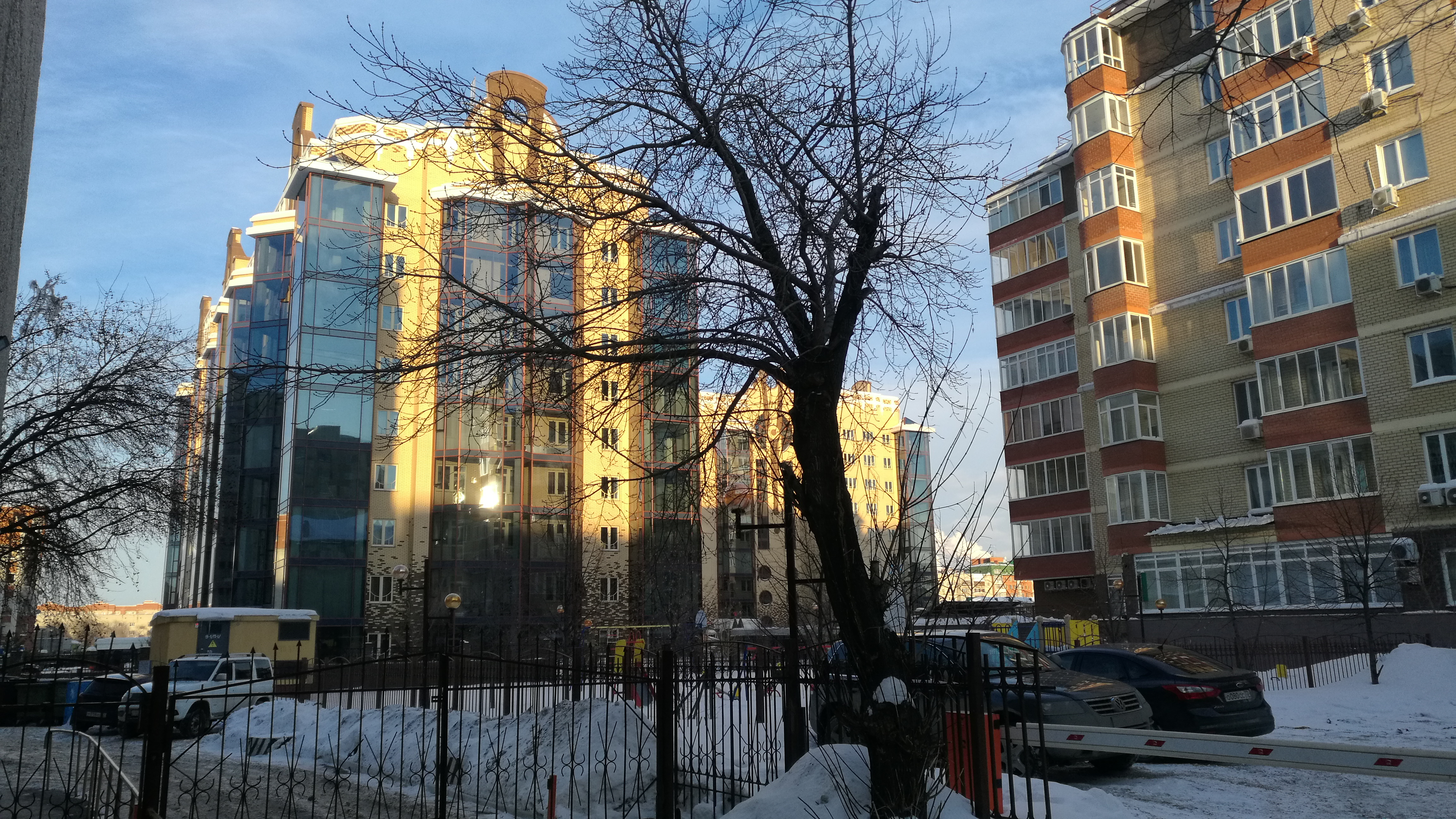 Loĝdomoj en strato Fabriĉnaja. Tjumeno, Rusio.